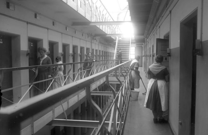 Ein Blick in das Frauengefängnis in der Barnimstr. in Berlin ! Ein Blick in die Zelleneingänge des Frauengefängnisses.